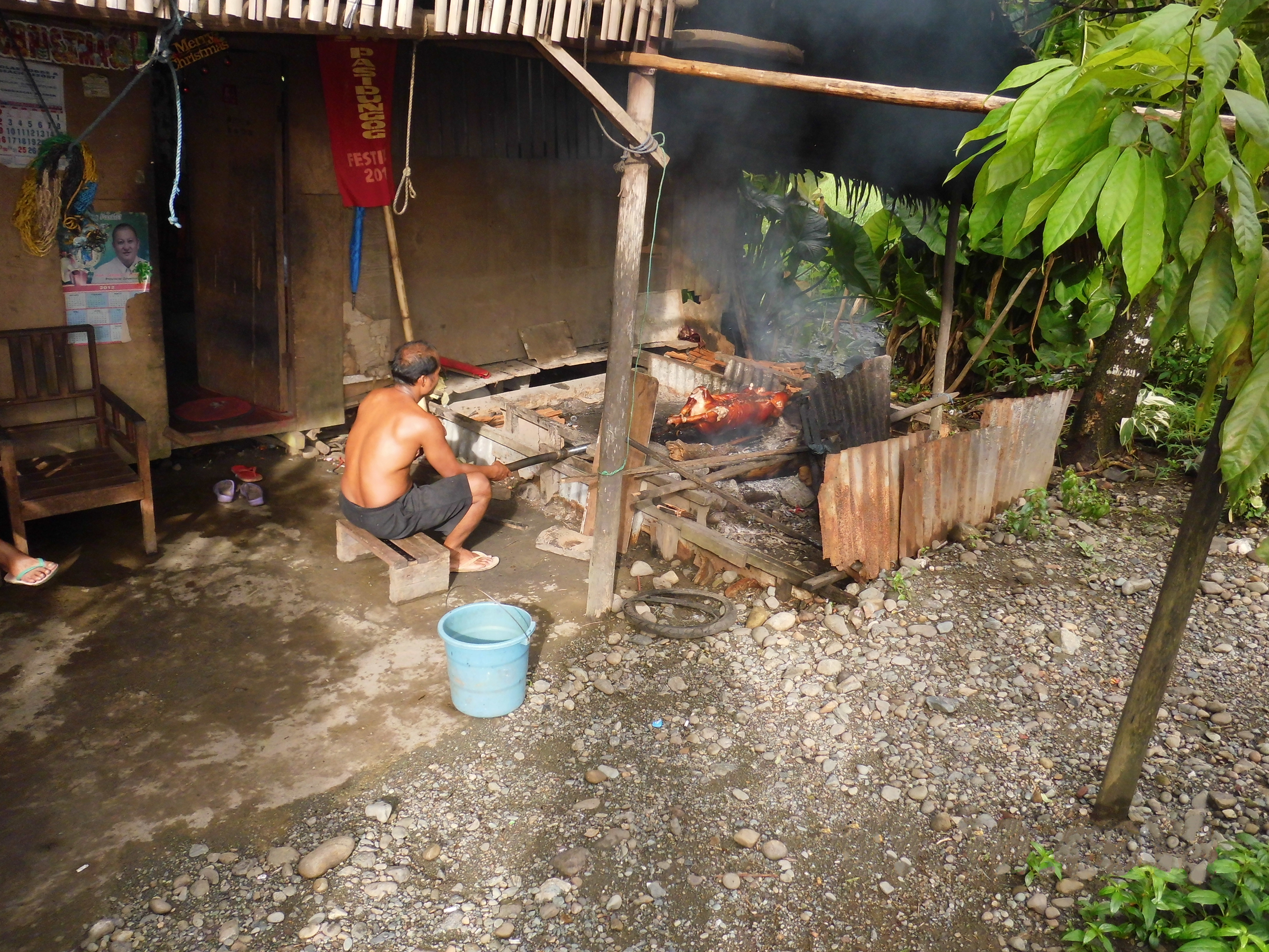 Cantilan_Lechon_House_2